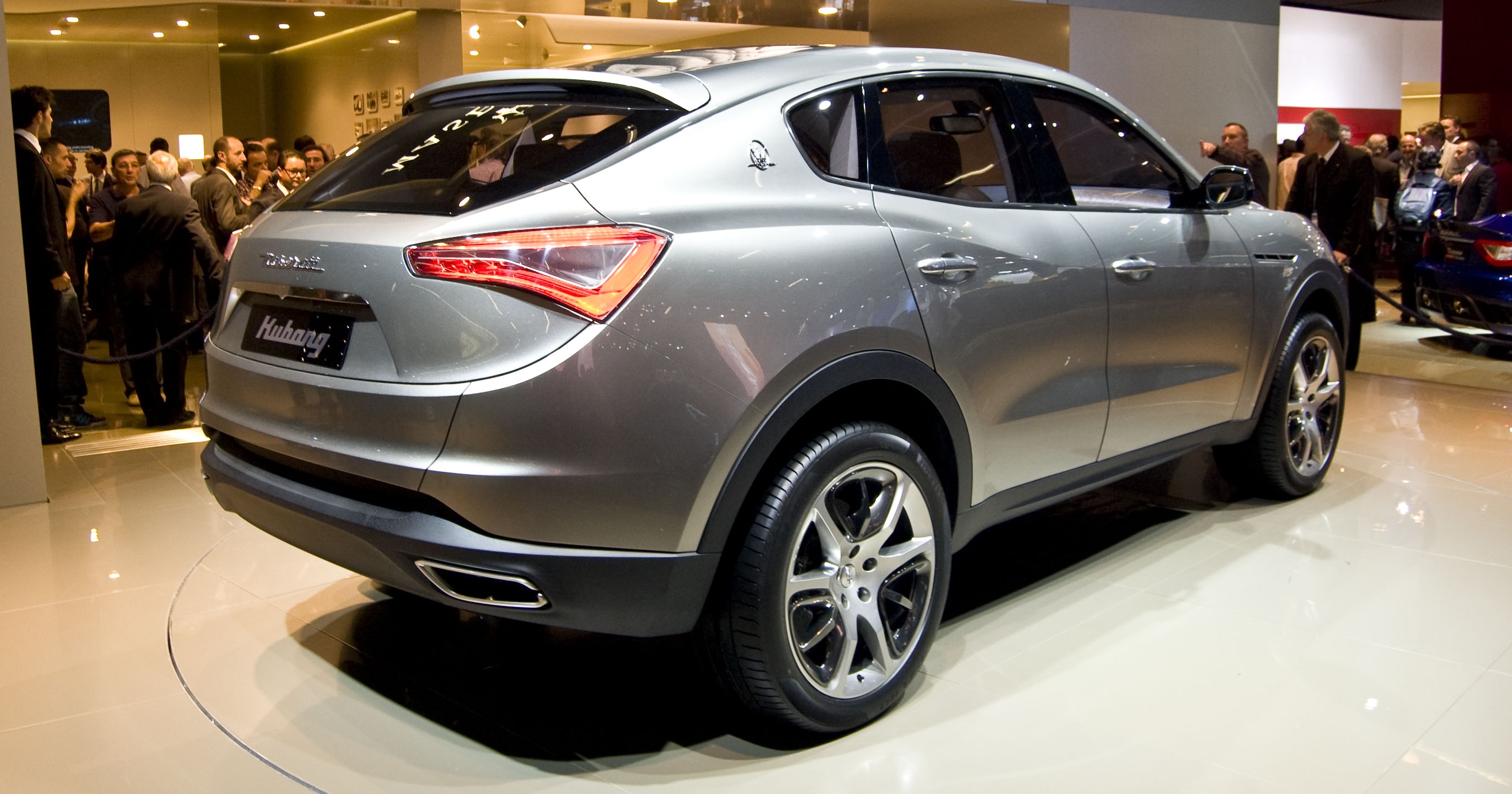 Maserati Kubang en el Salón del Automóvil de Frankfurt. Análisis en Diariomotor